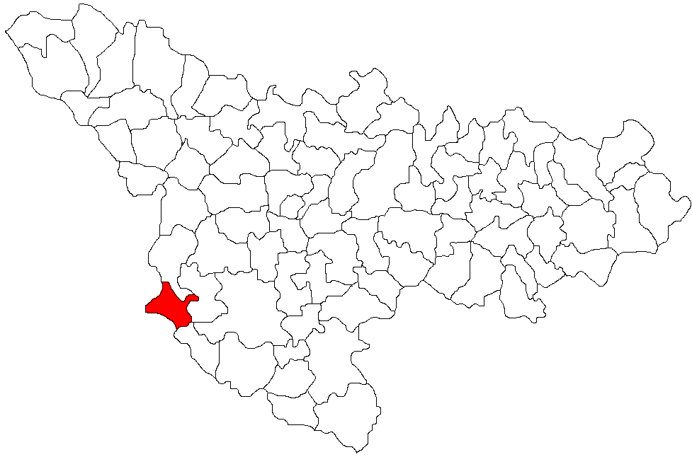 Foeni, Timis Categorie:Hărţi ale judeţului Timiş